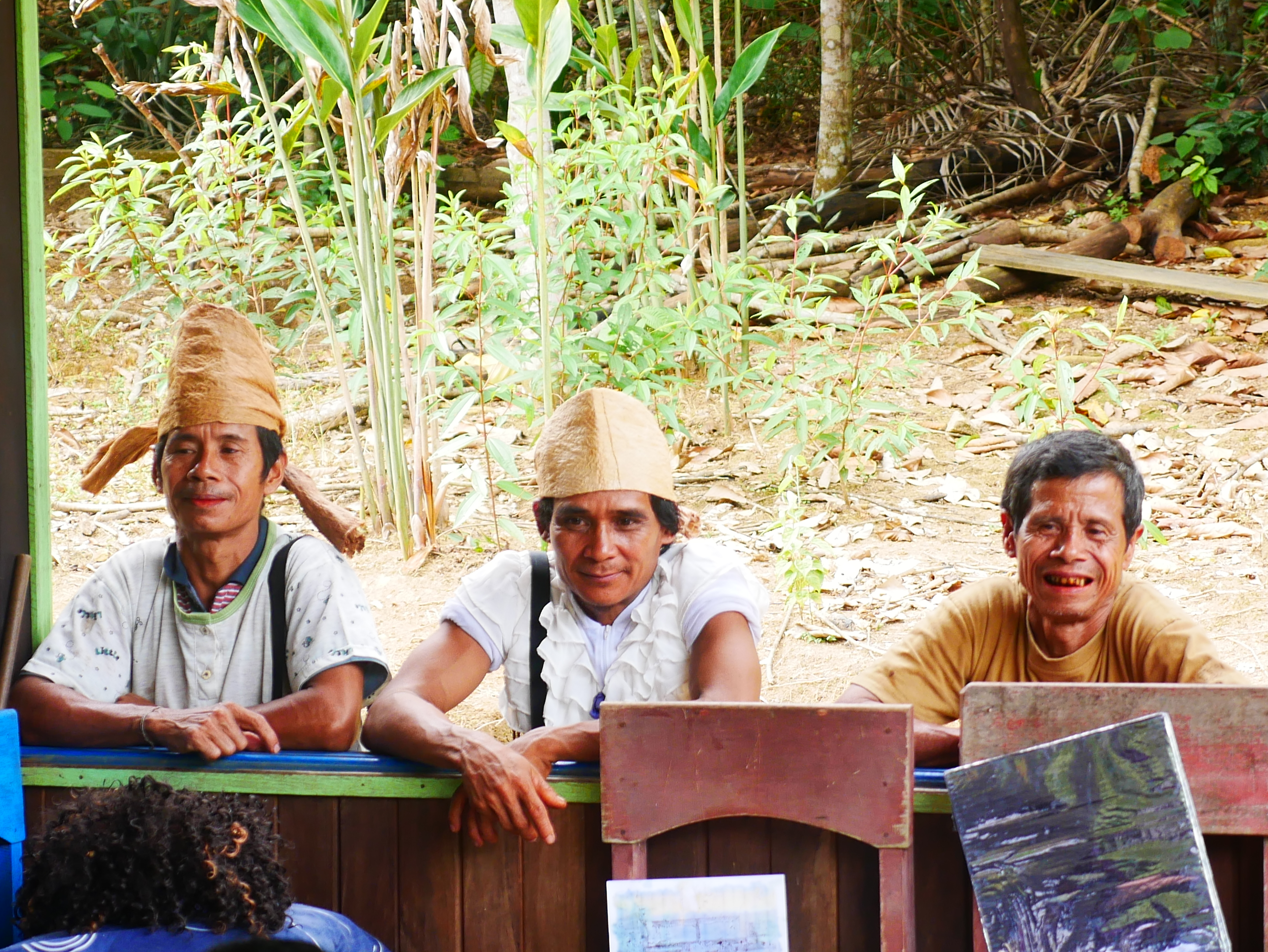 ini adalah foto karya saya sendiri.